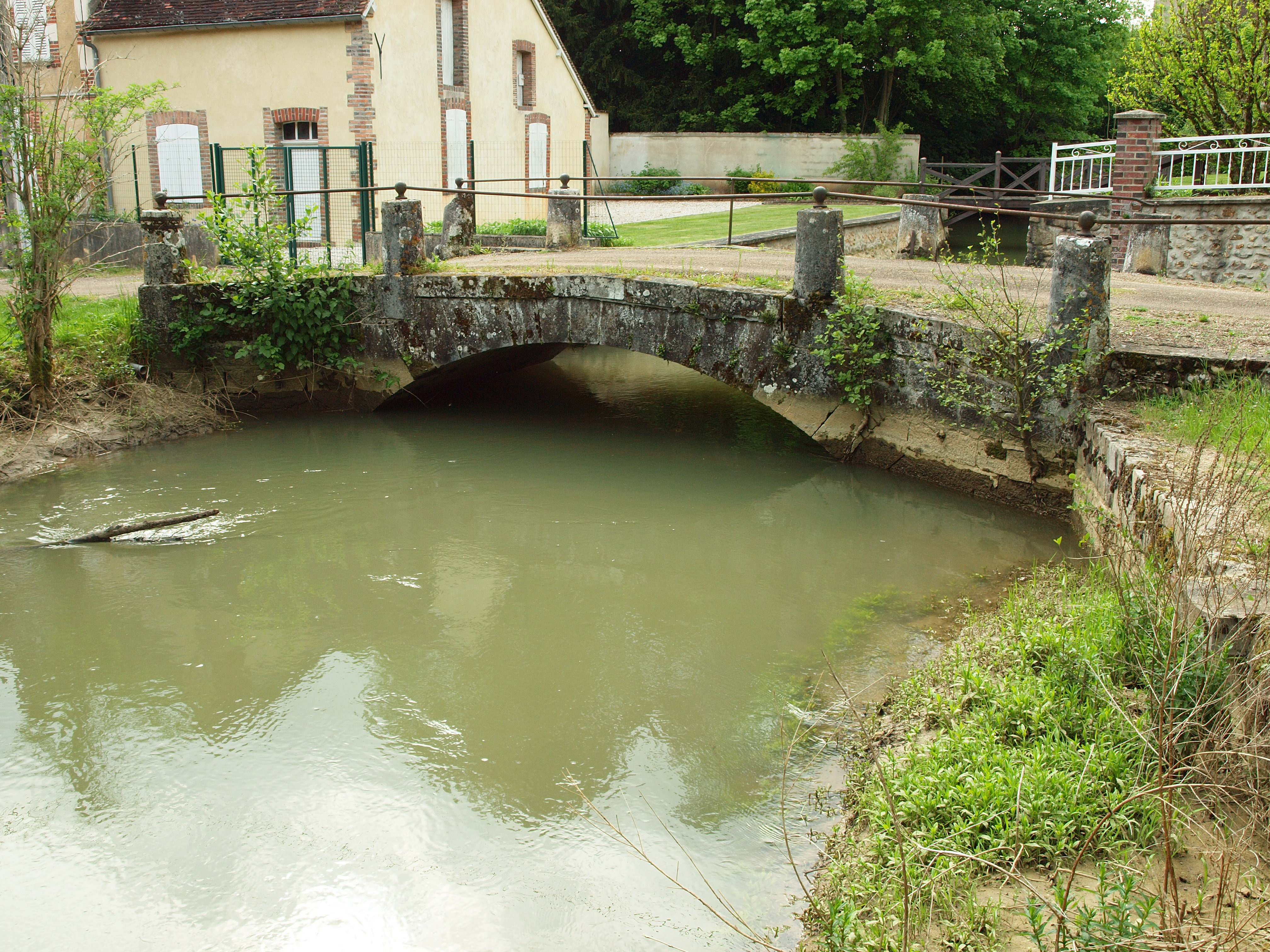 Villiers-Saint-Benoît (Yonne, France) ; pont sur l'Ouanne